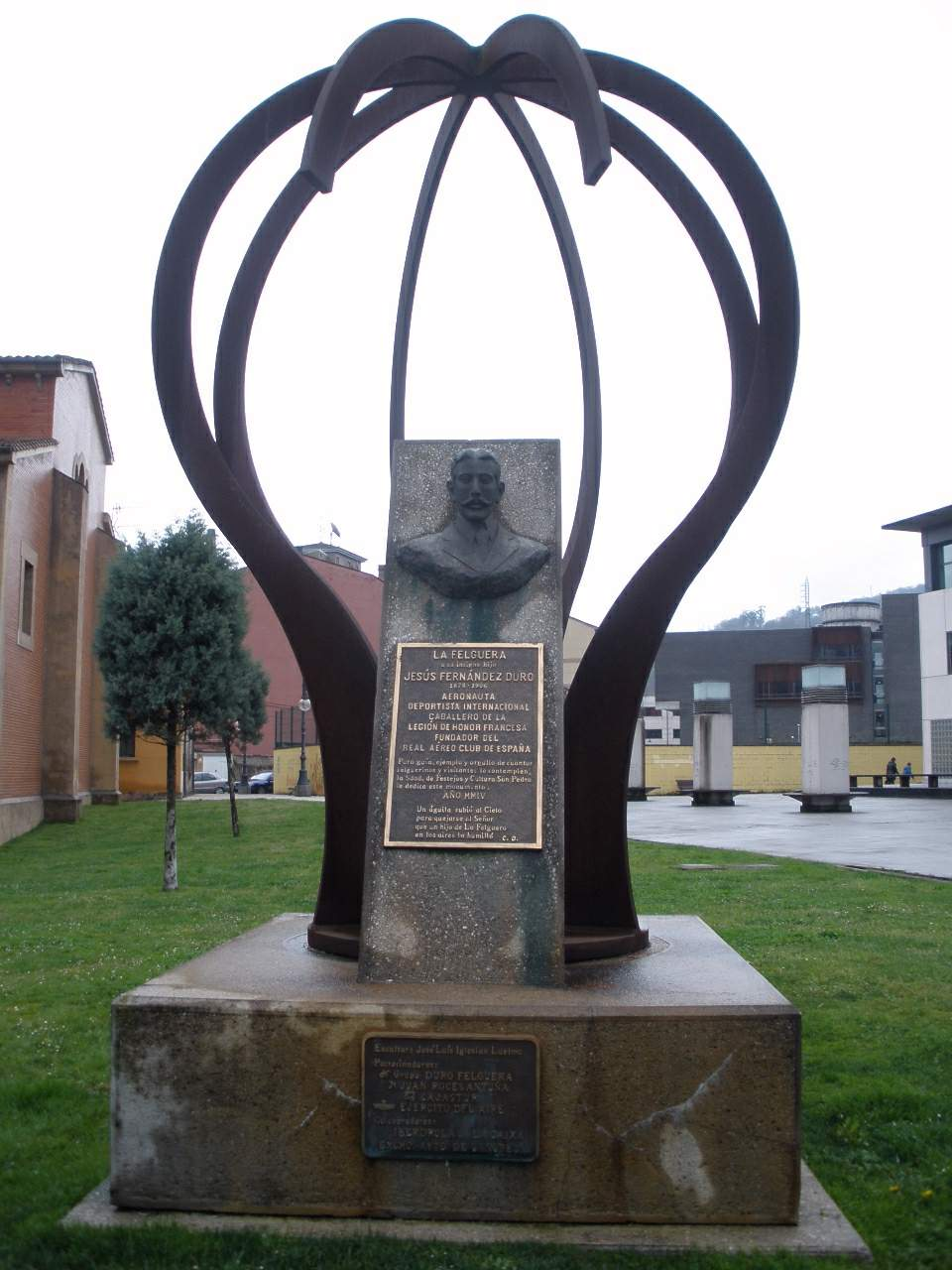 La Felguera de Langreo (Asturias)